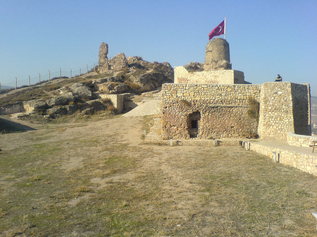 Castle in Kastamonu, Turkey